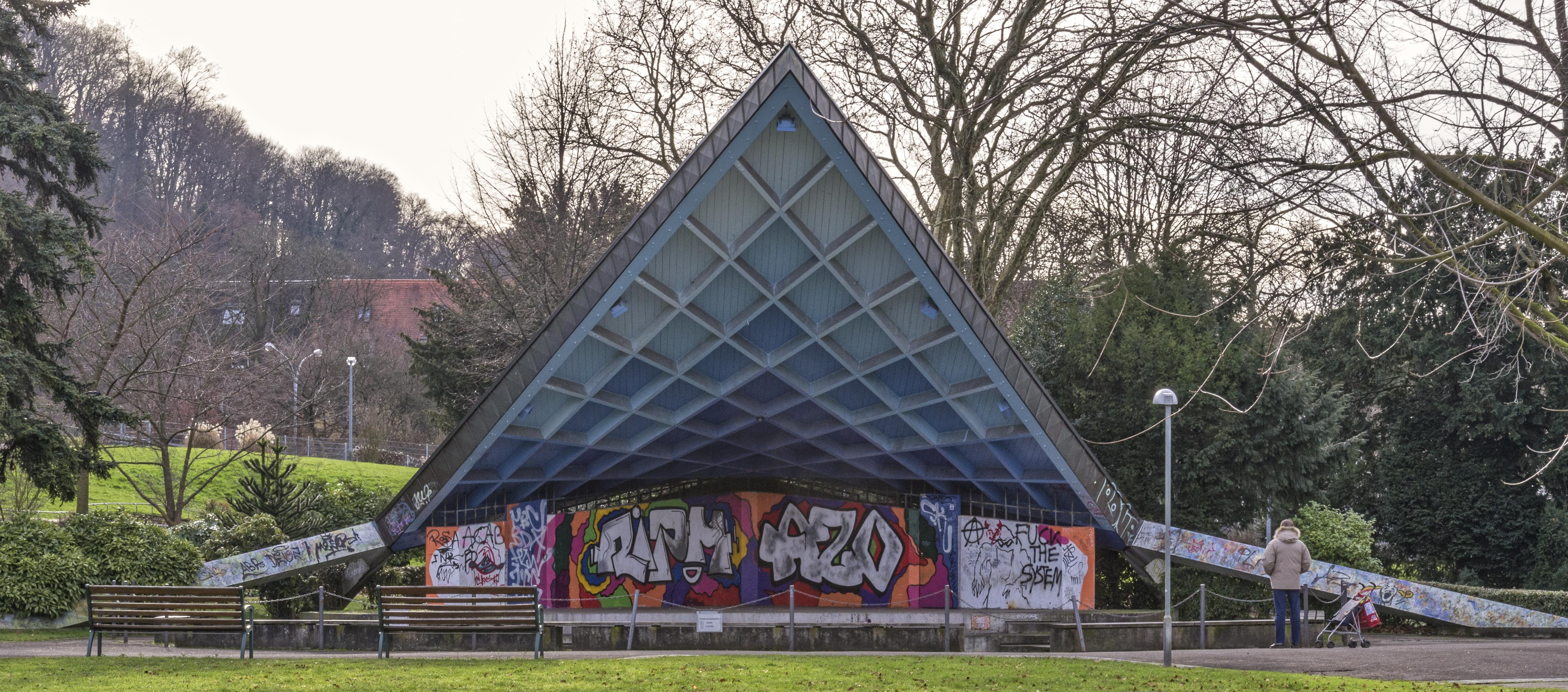 Bilder aus Freiburg im Breisgau Der Pavillon im Stadtgarten